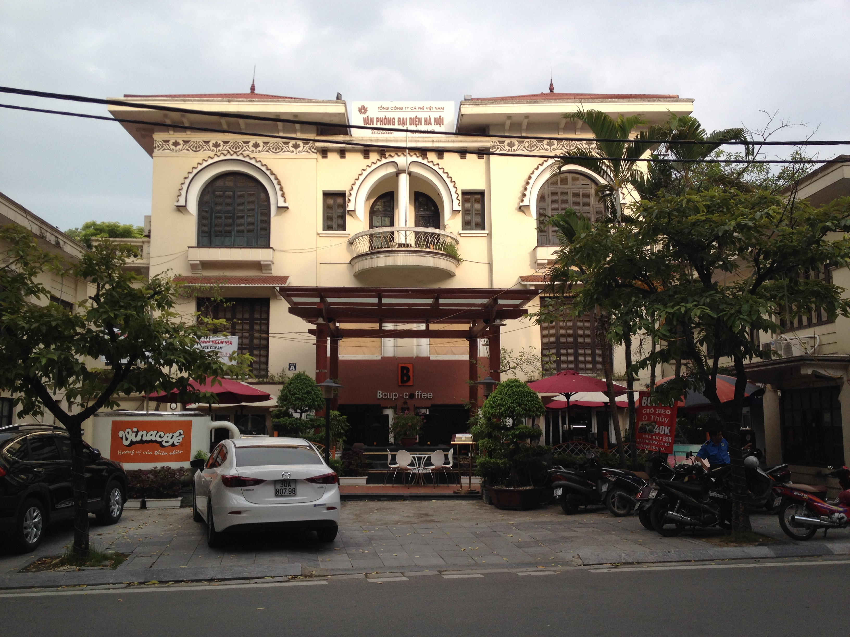 Hà Nội, Việt Nam.